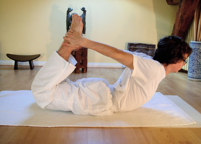 Yoga postures dhanurasana